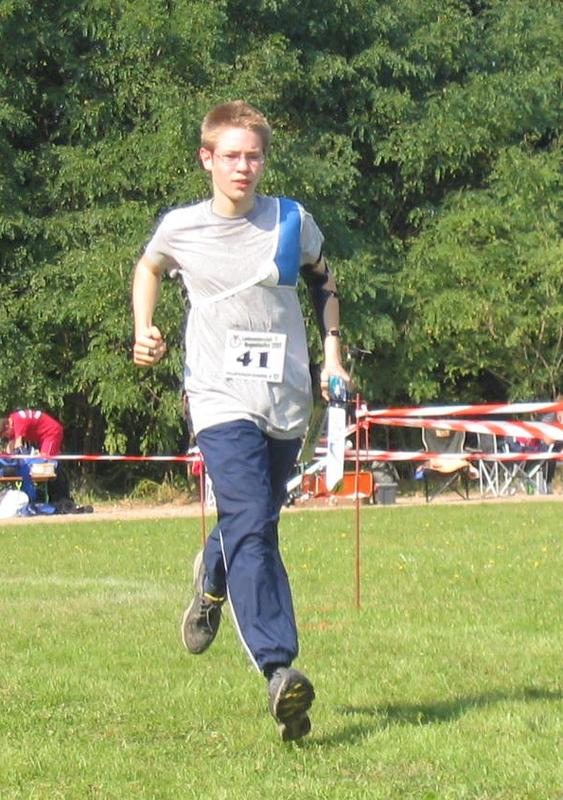 Läufer bei der Bogenlauf Landesmeisterschaften Brandenburg 2005 in Blankenfelde